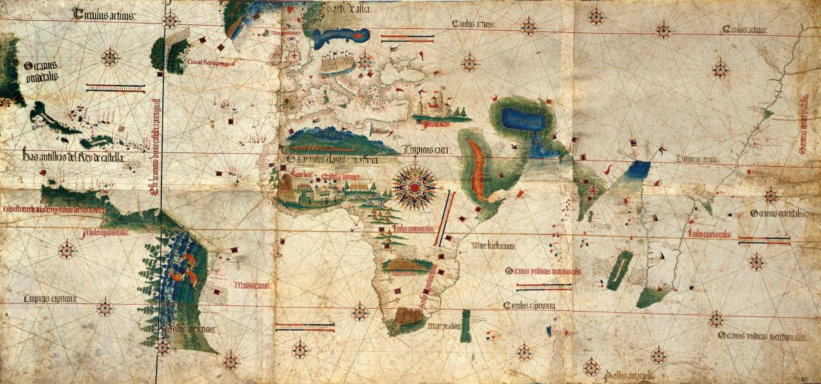 un planisferio de autor